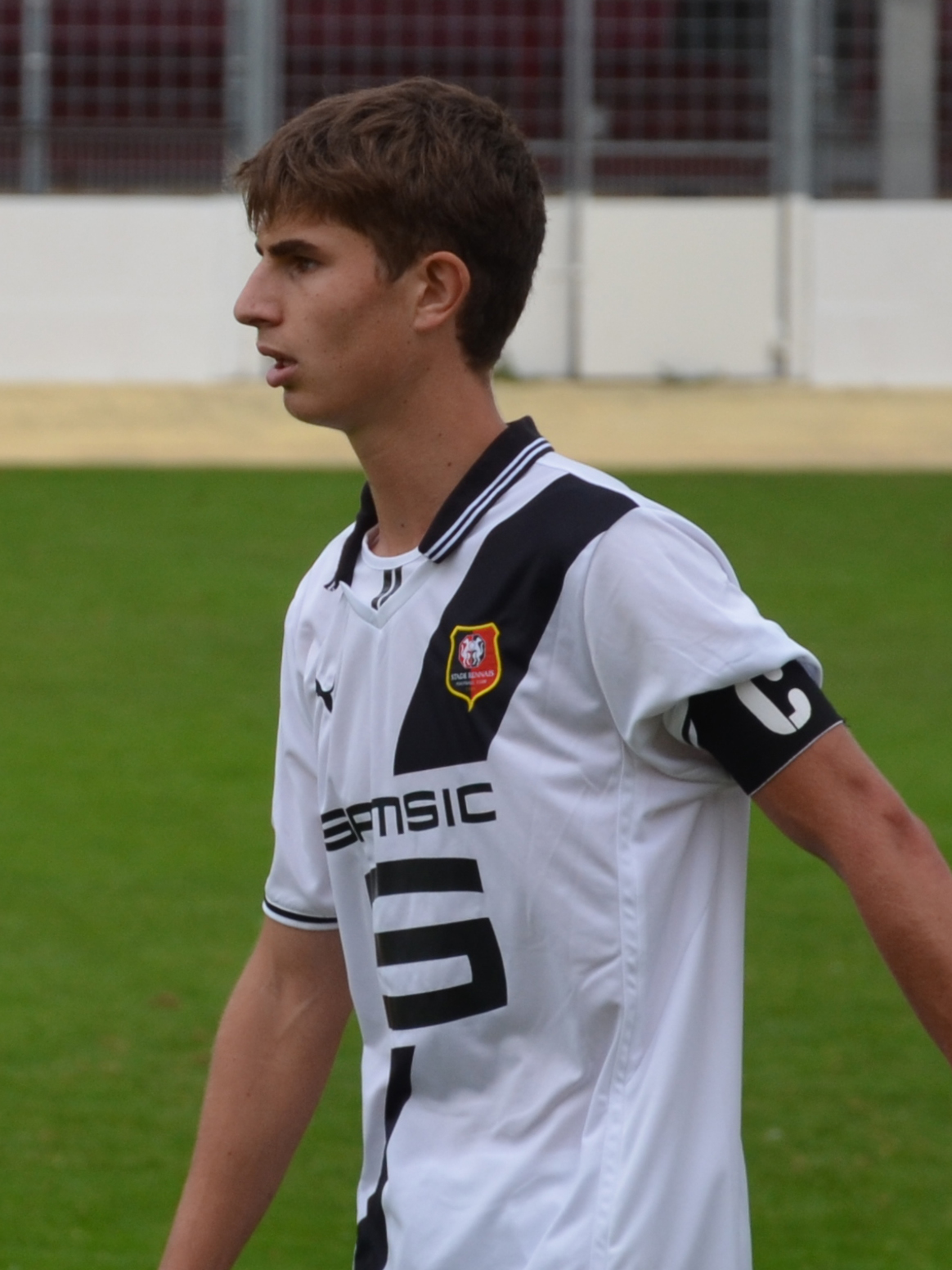 L'attaquant Pierre-Yves Hamel lors d'un match amical opposant les équipes réserves du Stade rennais et du Stade Malherbe Caen au stade de Venoix le 28 septembre 2013.